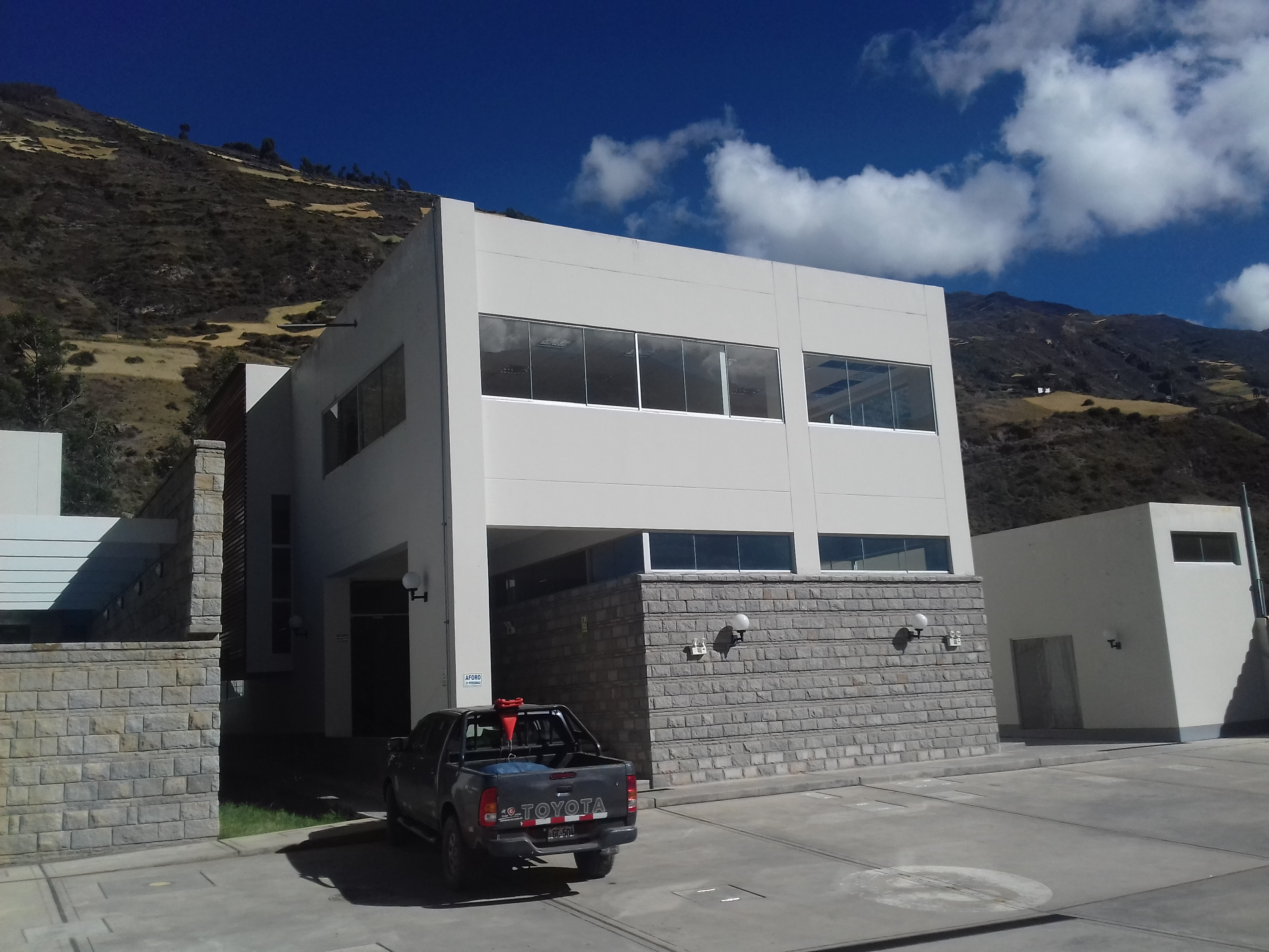 Frontis del Edificio del CIICR